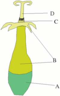 Buisbloem, egengemaakte tekening met draw